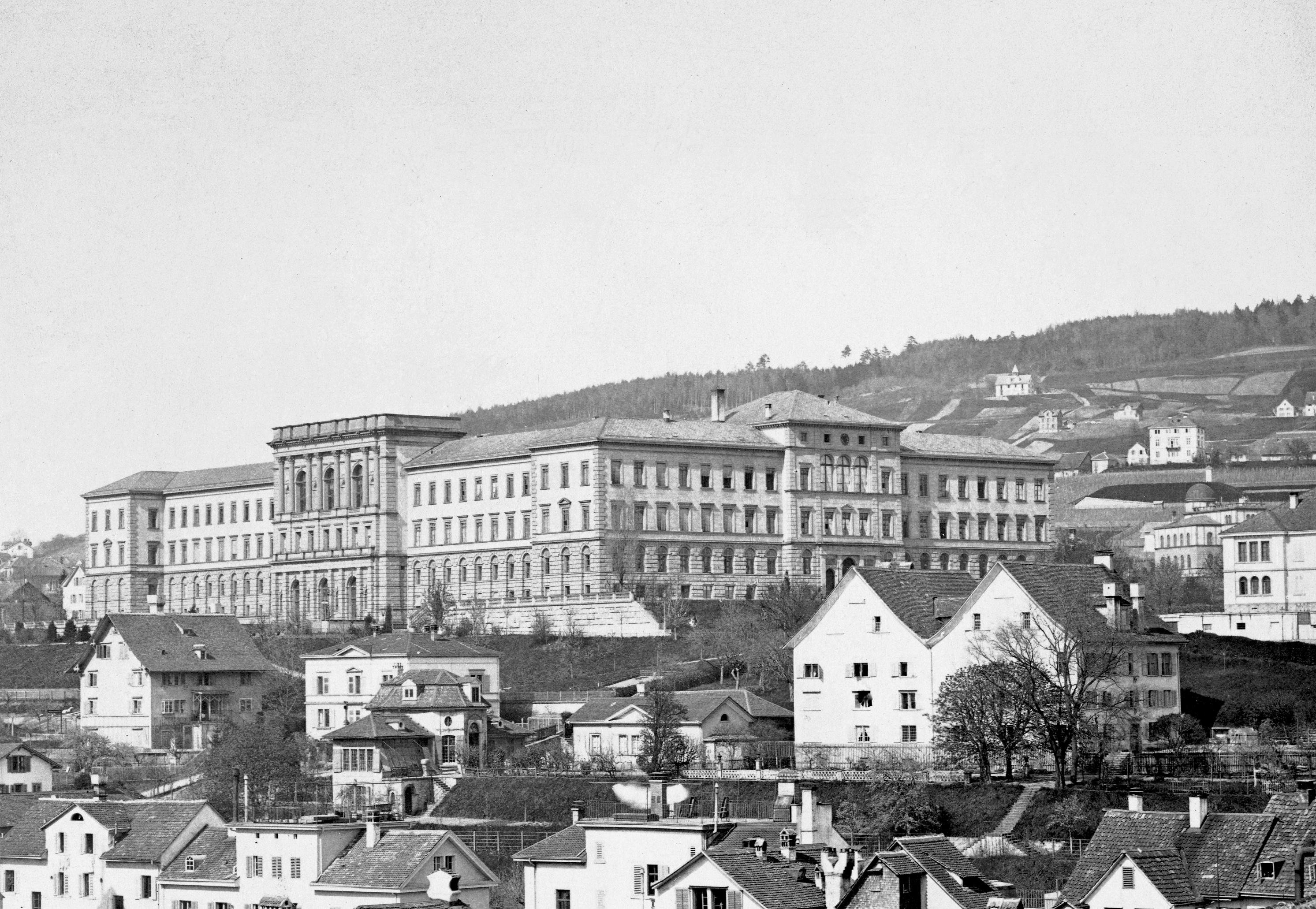 Das von Gottfried Semper errichtete Hauptgebäude der Eidgenössischen Technischen Hochschule Zürich 1880, vor den Umbauten durch Gustav Gull nach 1915